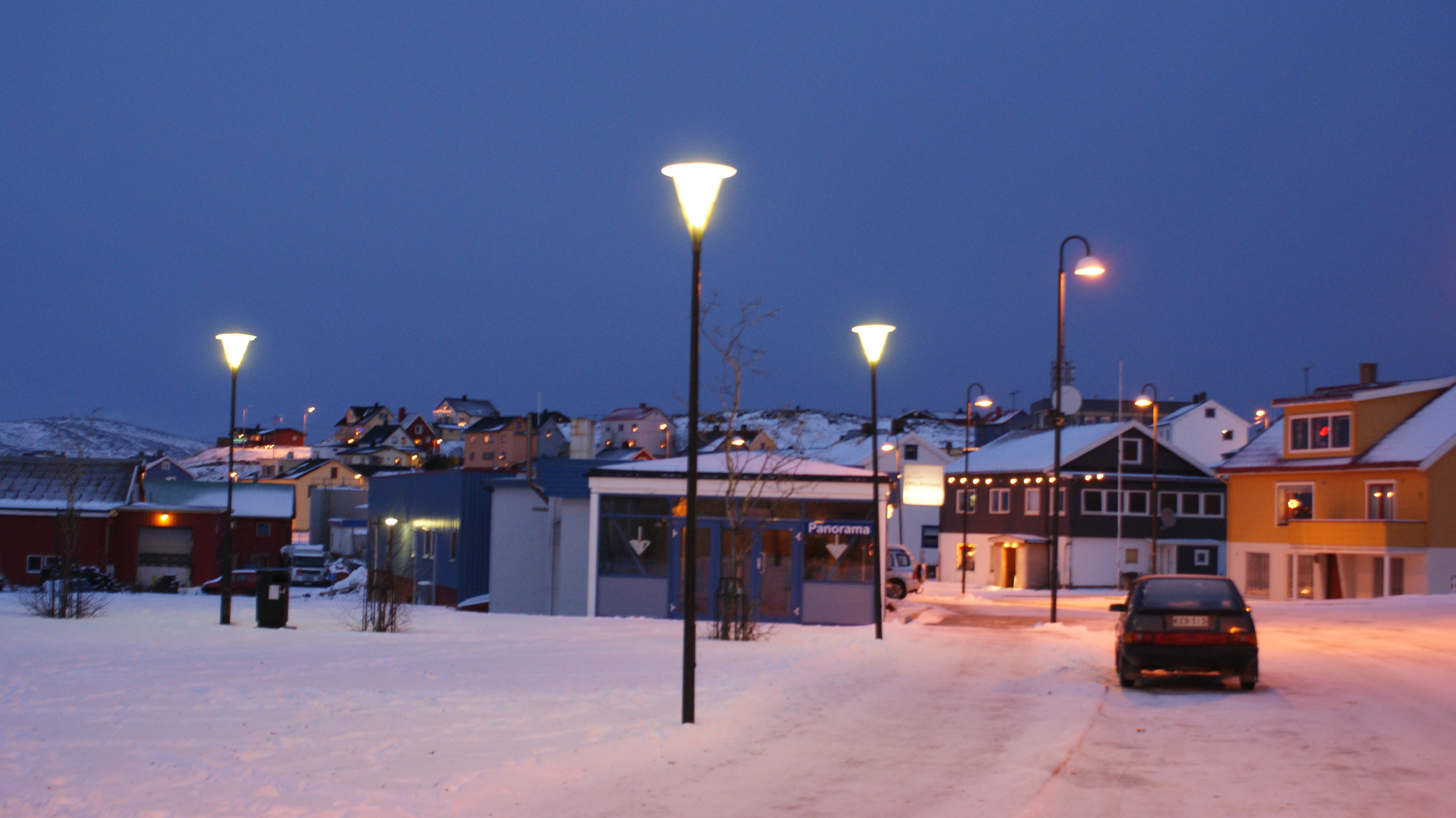 Mehamn, Nordkinnhalvøya, Finnmark, Norway.